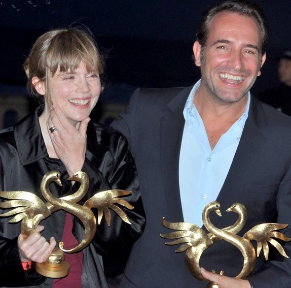 Isabelle Carré et Jean Dujardin recevant les Swann d'or de la meilleure actrice et du meilleur acteur au festival du film de Cabourg